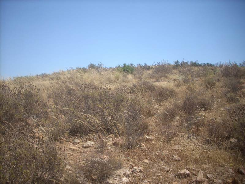 Vista de la loma donde se encuentra la Torre de los Almendros